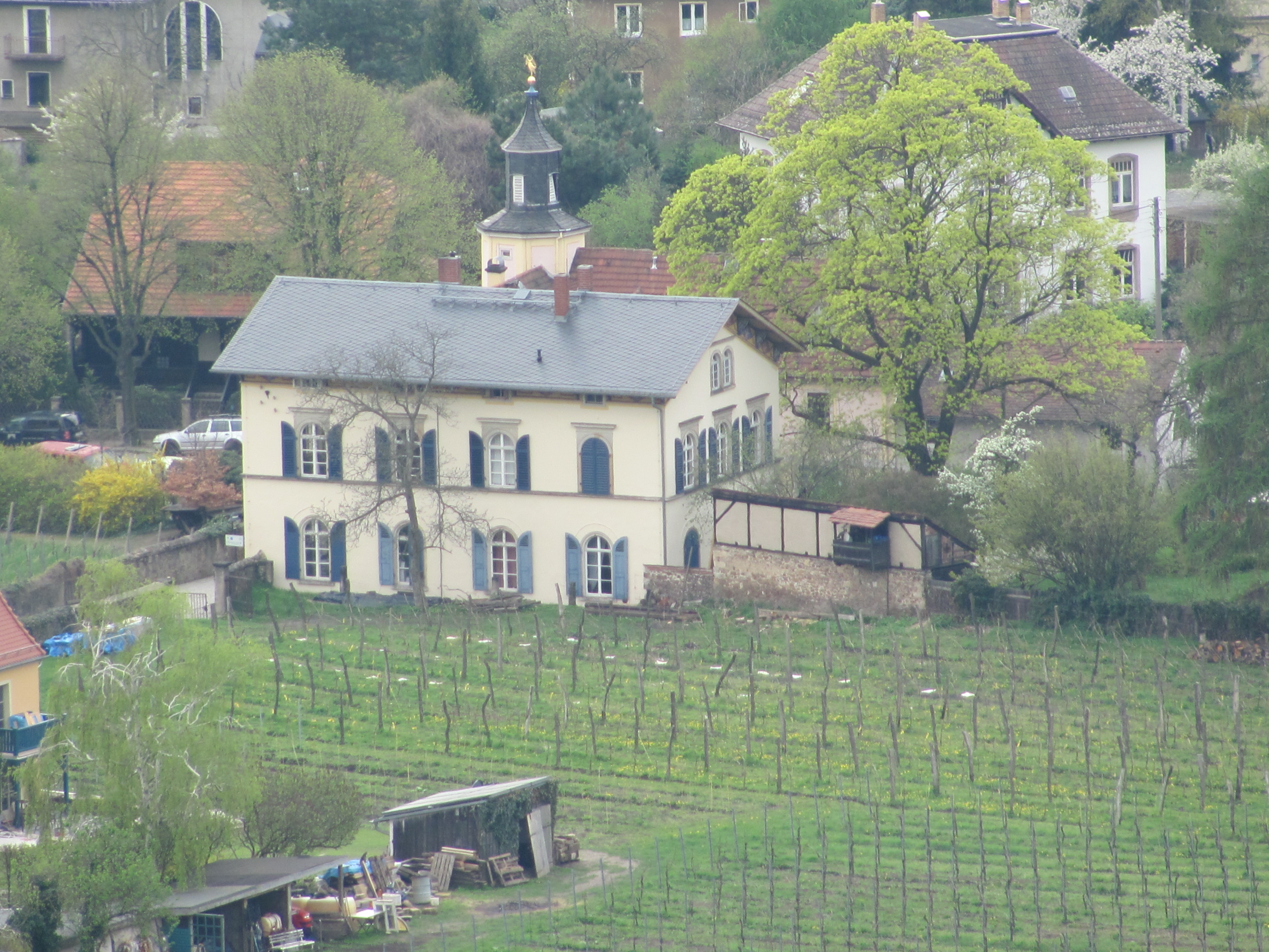 Radebeul, Meinholdsches Weingut von der Cikkurat aus gesehen, fotografiert am "6. Tag der Offenen Aussicht" in Radebeul